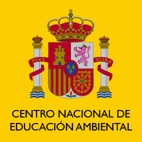 Logotipo oficial del CENEAM